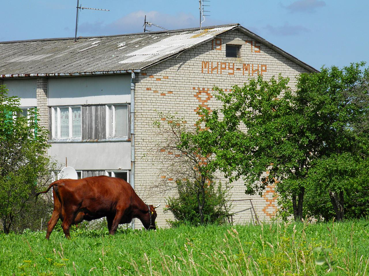 МИРУ - МИР!!!